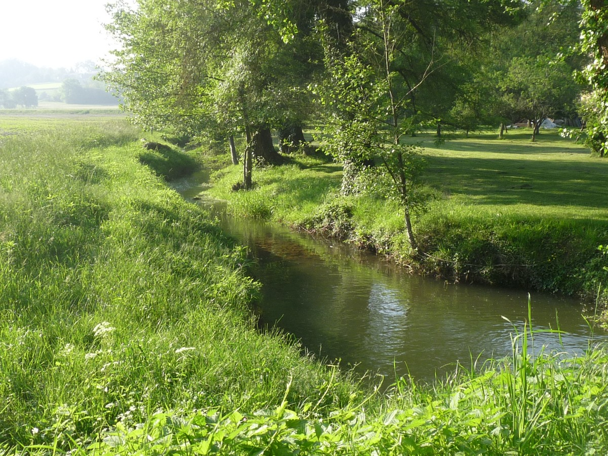 La Viveronne entre Brie et Bardenac (Charente, France)